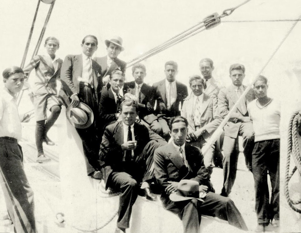 En esta foto se muestra a José María Quiñones Arízola y sus tres Hijos en el muelle de Pimentel.